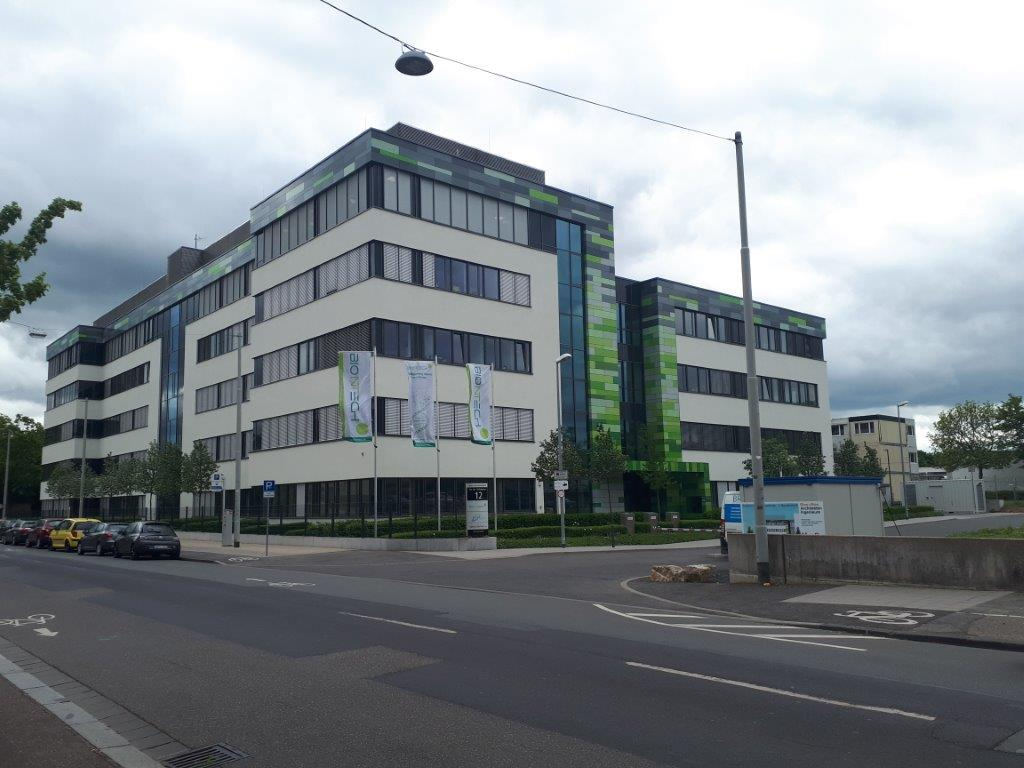 Goldgrube, Mainz; Gebäude der Biontech